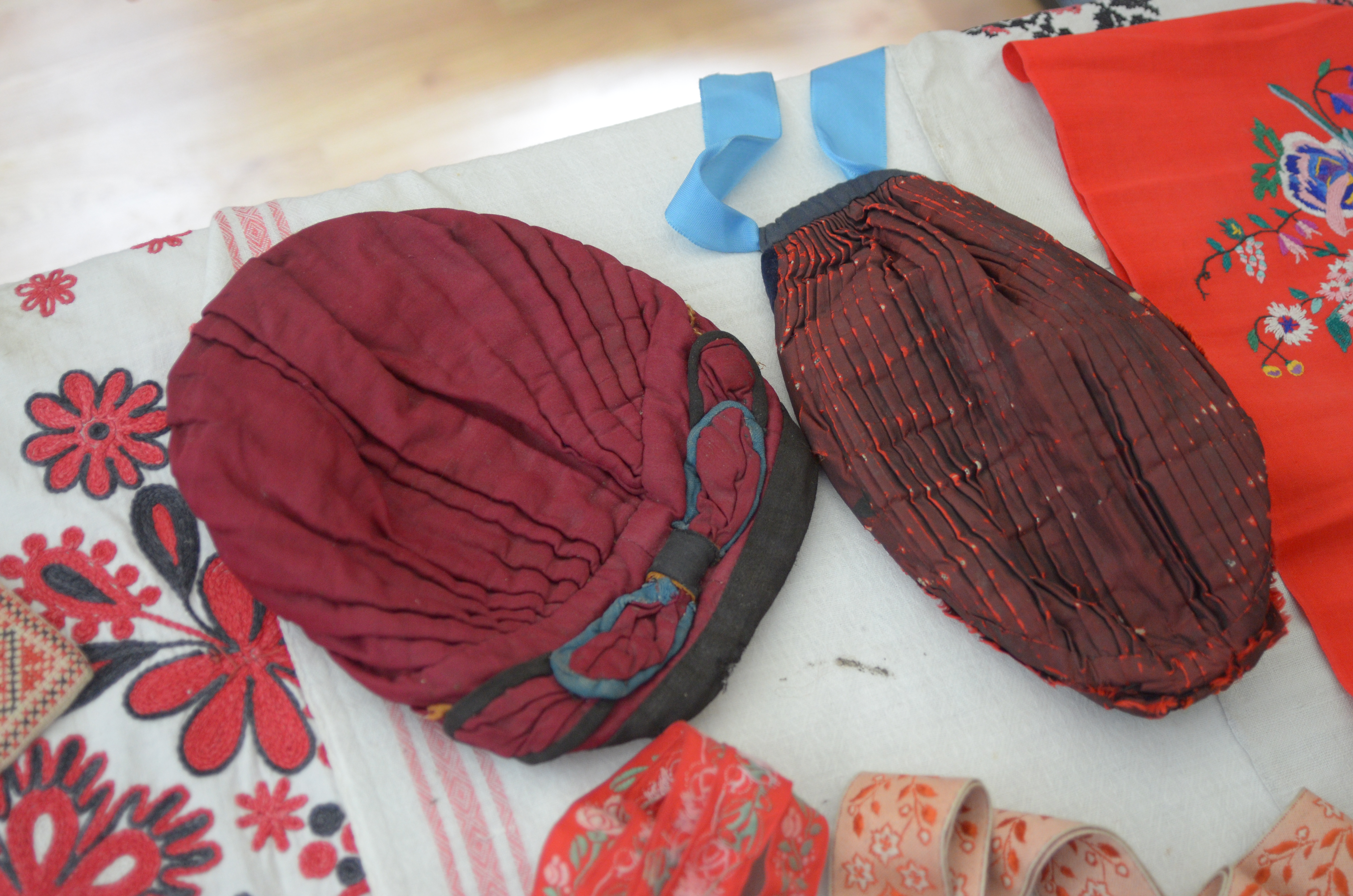 Фестиваль славянской культуры в Донецке.